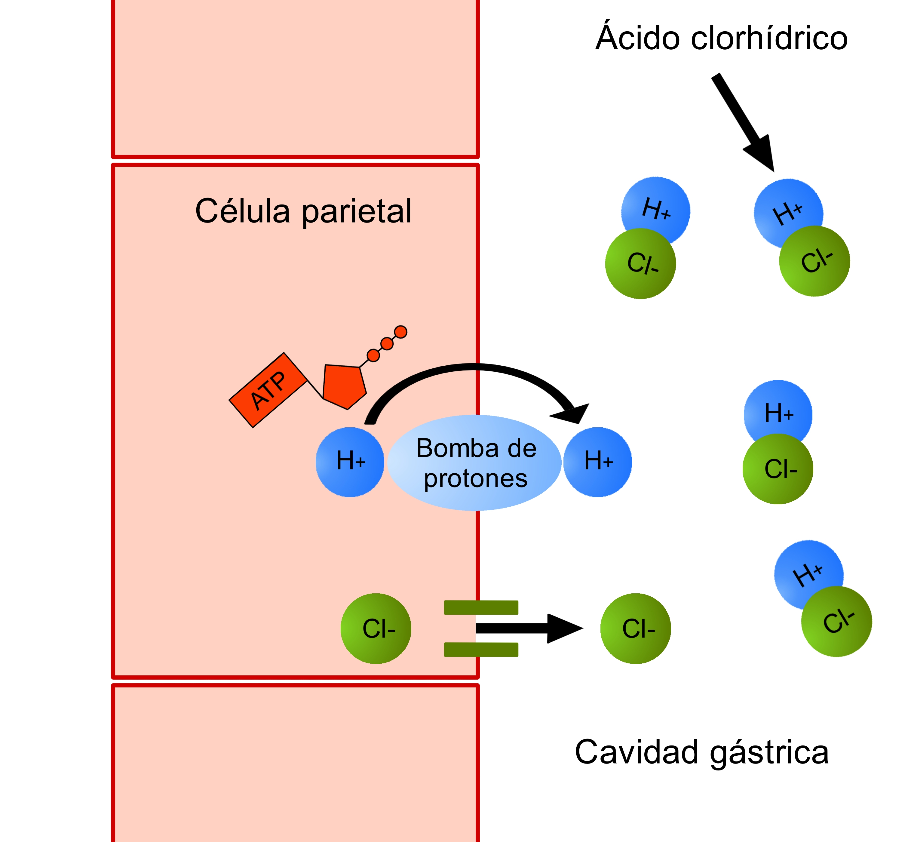 Esquema en el que se muestra el proceso de secrección de ácido clorhídrico por las células parietales de la pared del estómago.